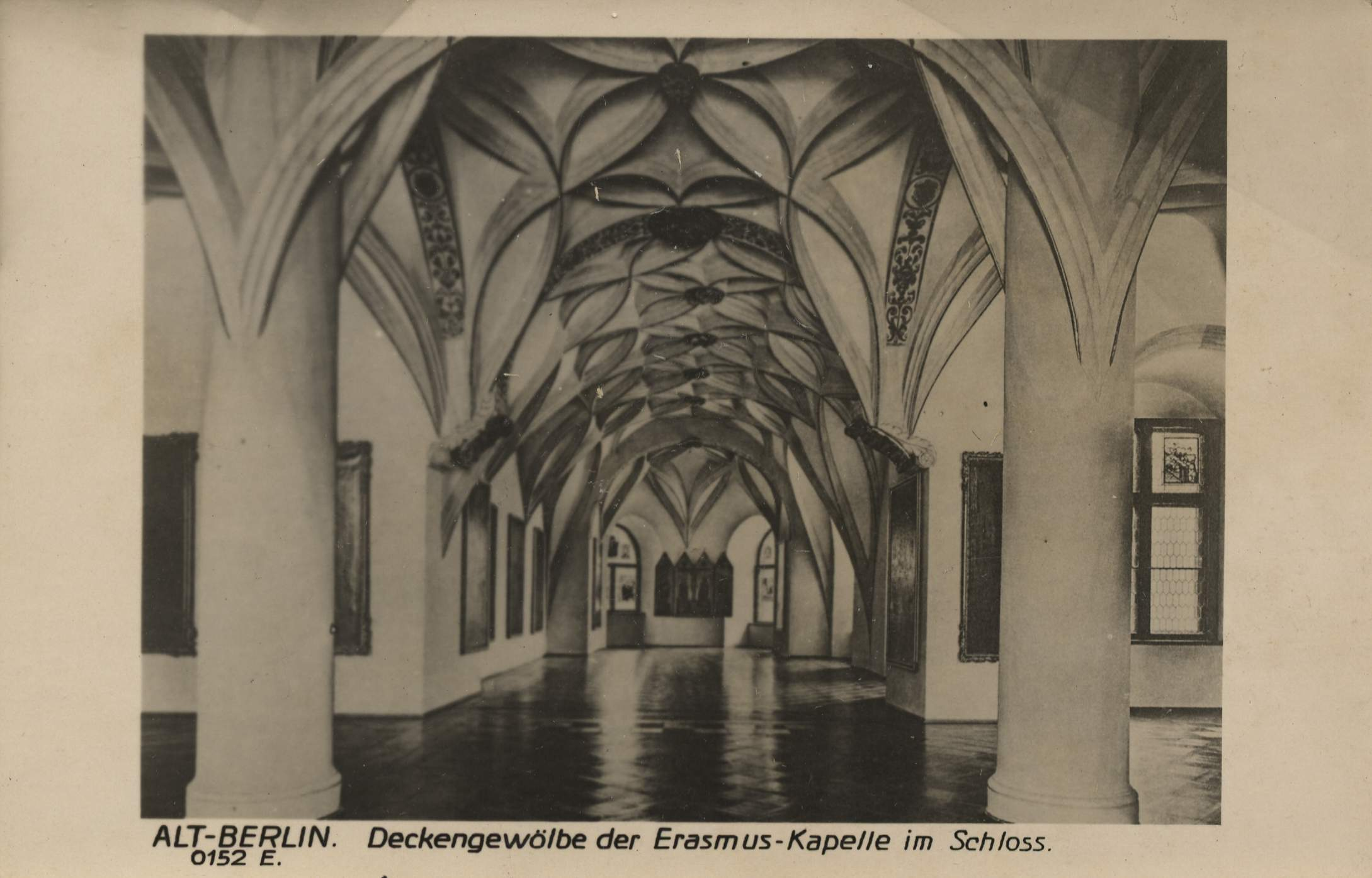 Kgl. Schloss, Deckengewölbe der Erasmuskapelle